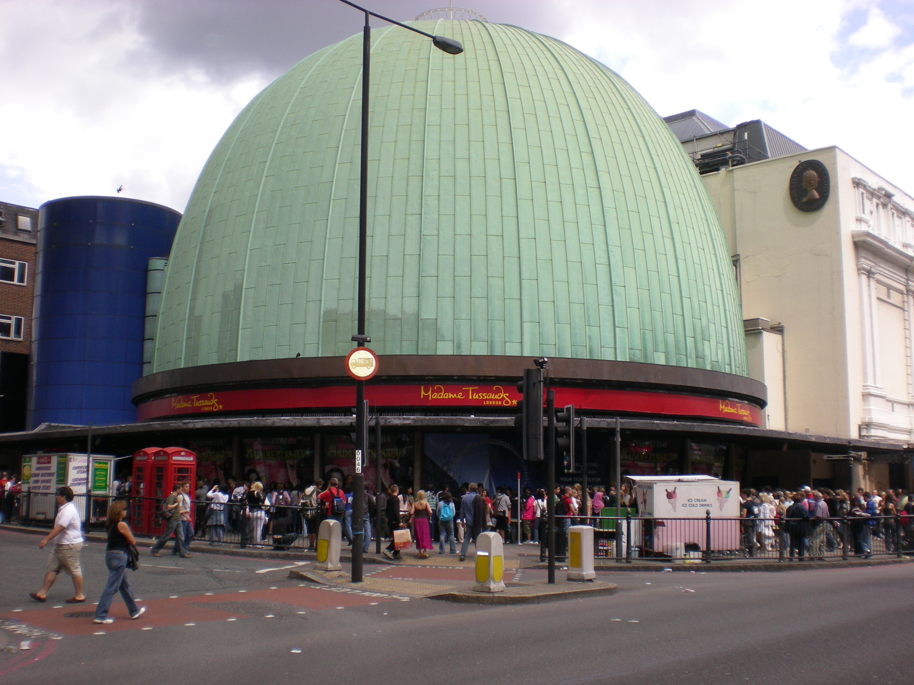 Museum Madame Tussaud, London